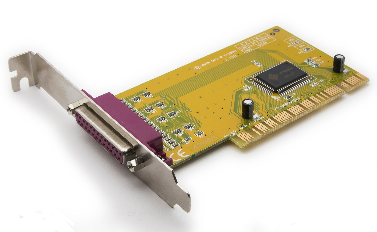 Parallelport PCI controller